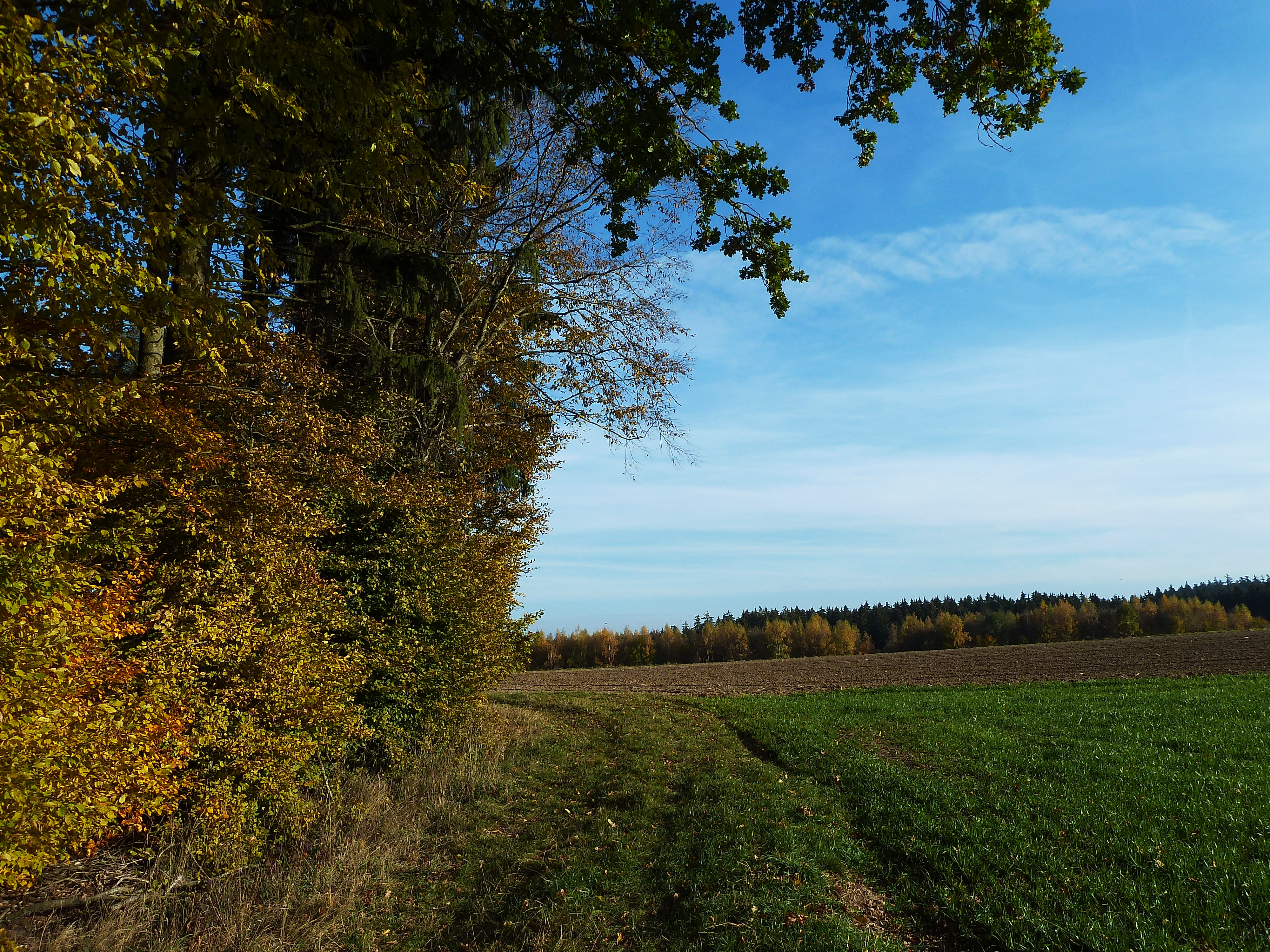 Edge of the woods (Upper Swabia)